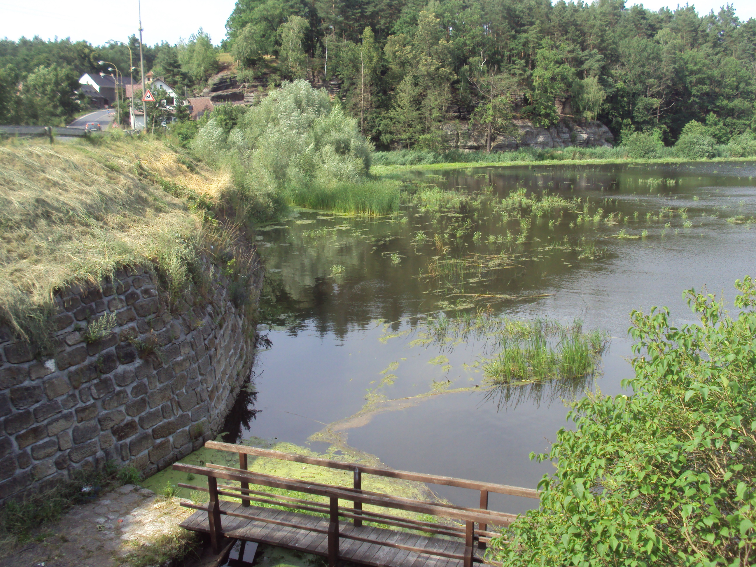 Rybník u výpusti